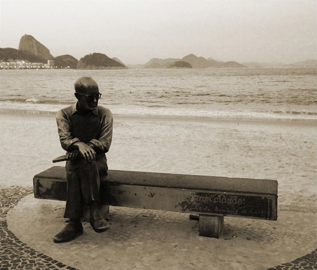 Estatua de Carlos Drummond de Andrade en Copacabana